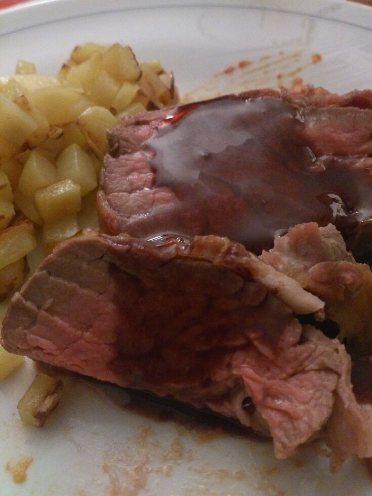 Del filetto di manzo italiano (razza piemontese) lardellato con pancetta piacentina in salsa di vino rosso montepulciano d'abruzzo DOCG. Cucina italiana ricetta di ristorazione di alto livello. Prodotto in Italia